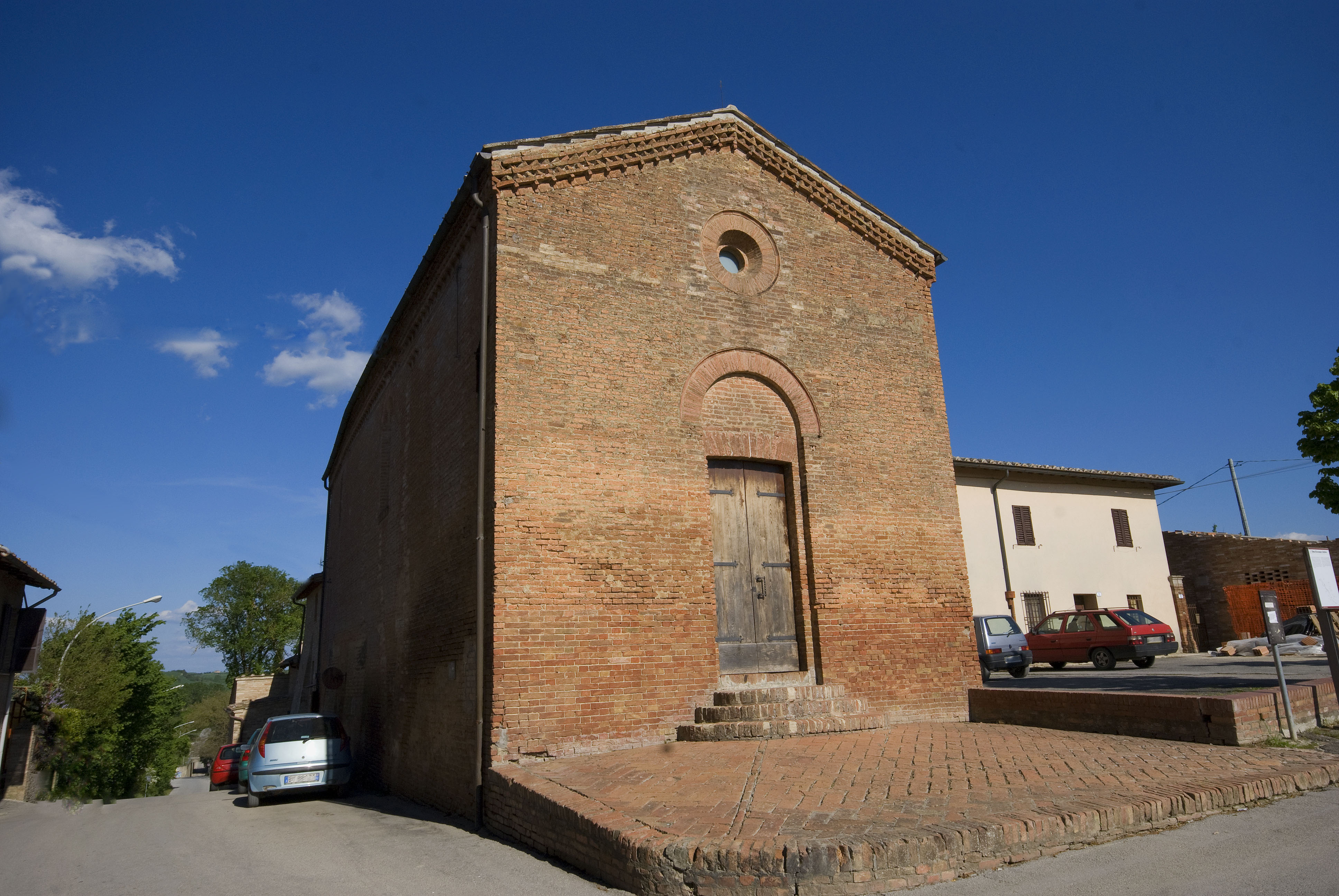 see title